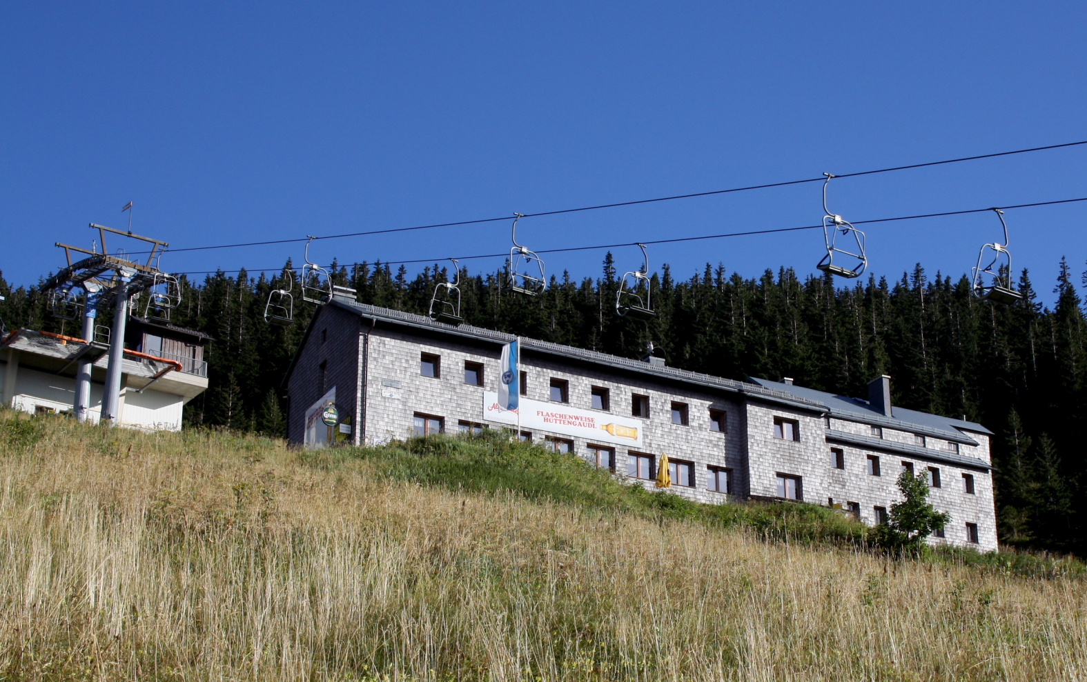 Das Ötscherschutzhaus auf dem Ötscher in den Ybbstaler Alpen, Niederösterreich.